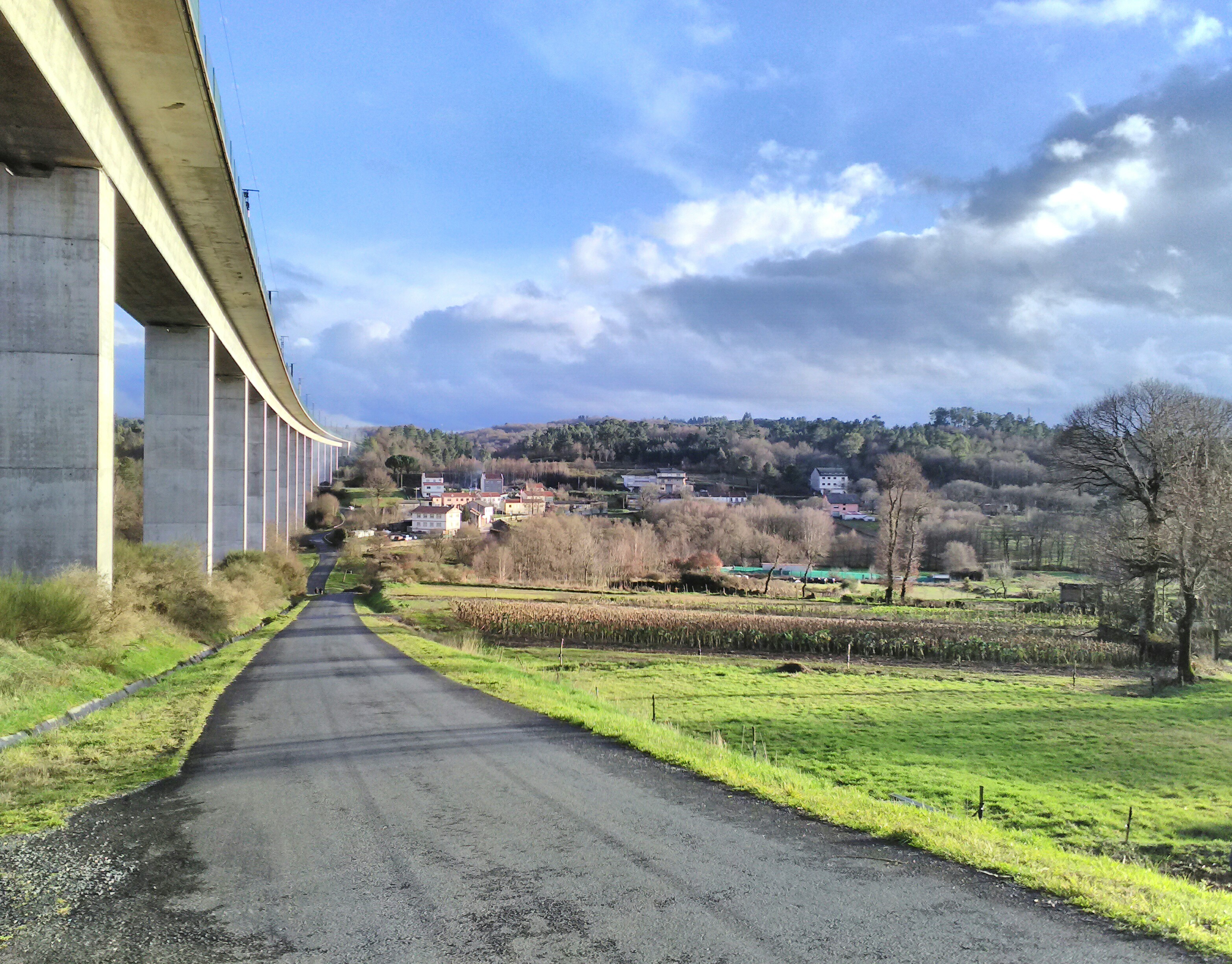 Vista parcial da aldea de Reguengo, da parroquia de Botos (Lalín), a carón do viaduto do ferrocarril